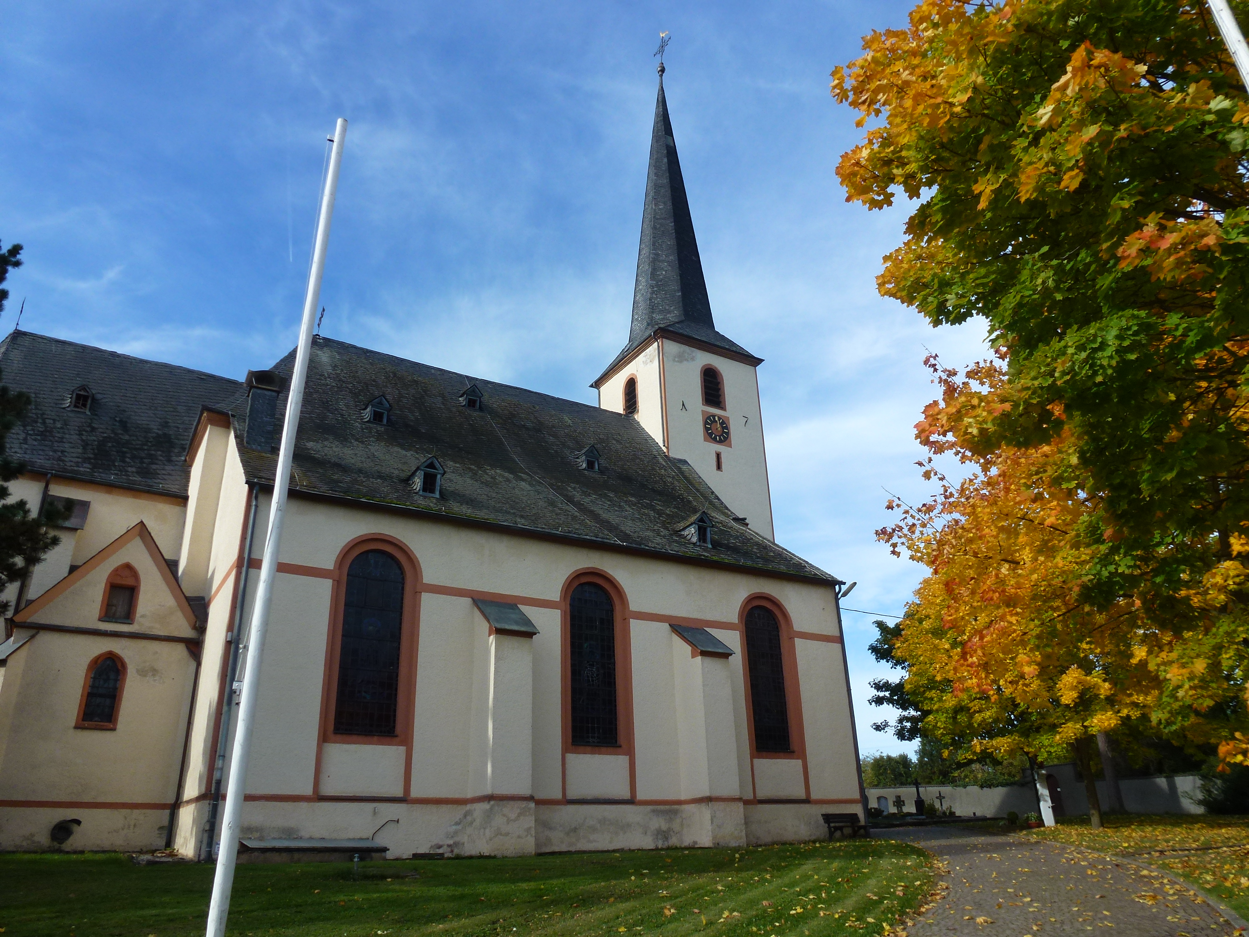 Katholische Pfarrkirche St. Stefan Leiwen